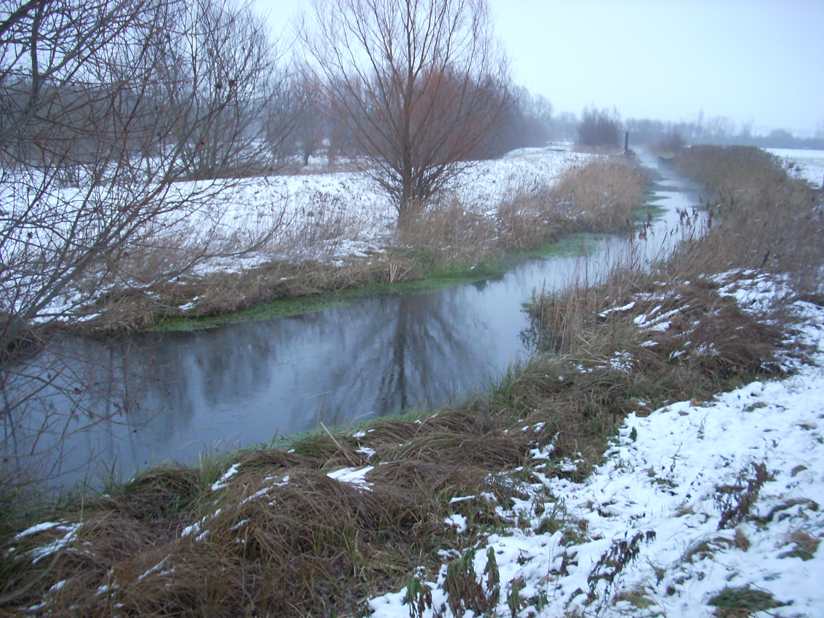 Hévízi-csatorna kanyarulata a 75-ös út alatt